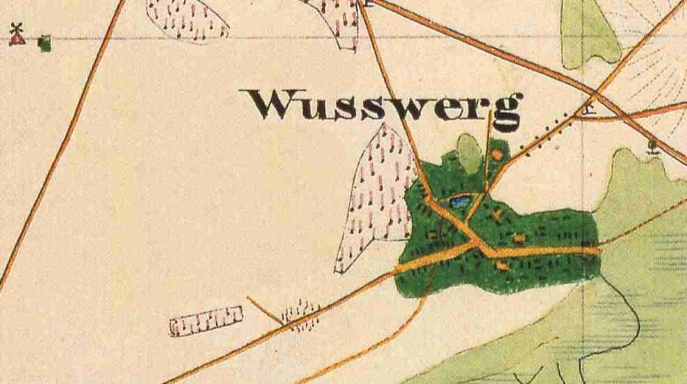 Wußwerk, Ortsteil der Gemeinde Alt Zauche-Wußwerk, Landkreis Dahme-Spreewald, Brandenburg, Ausschnitt aus dem Urmesstischblatt 4050 Straupitz von 1846